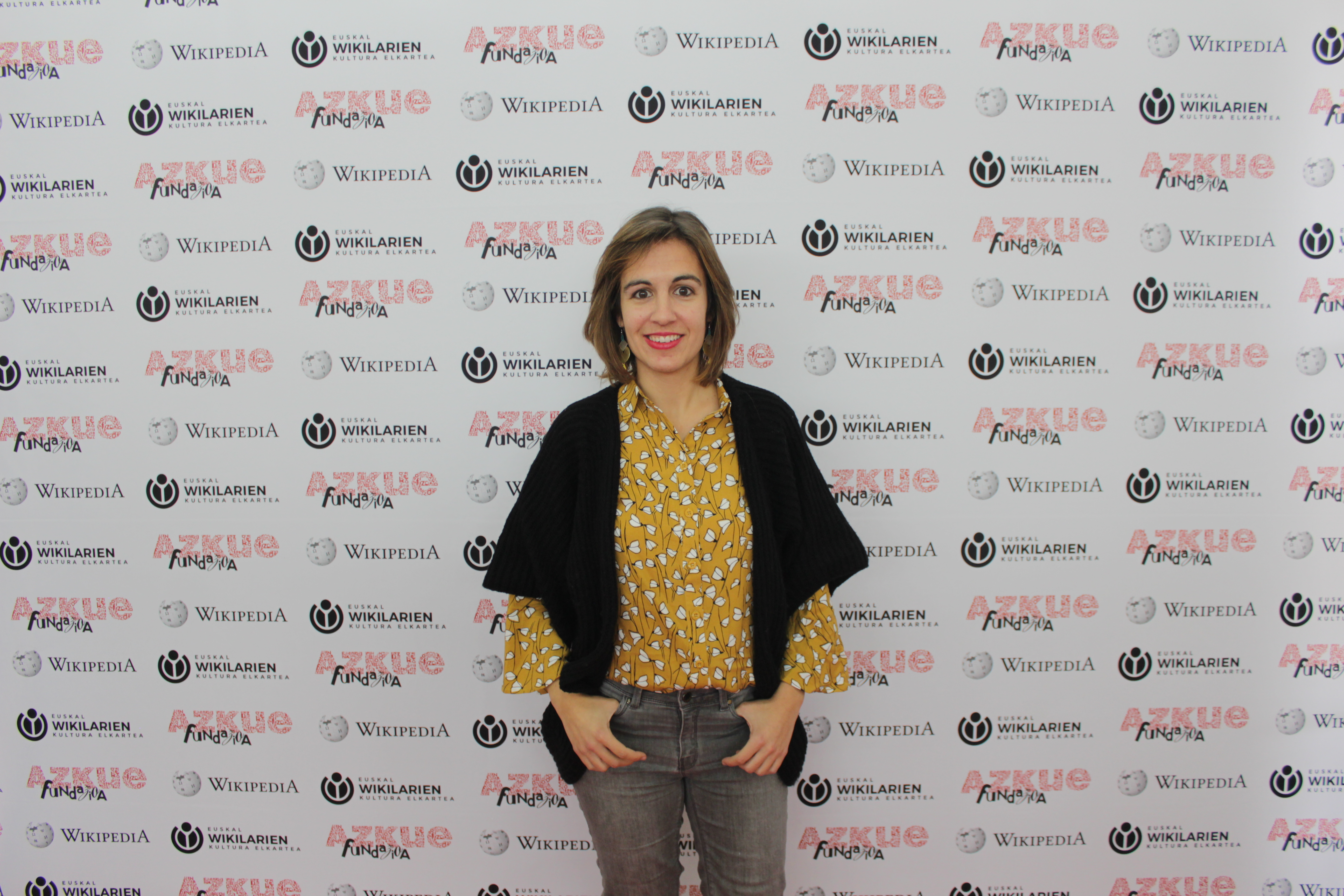 Katixa Agirre idazlea 2017ko Durangoko Azokan